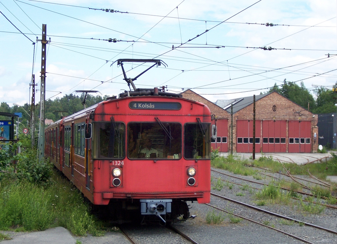 Et vestgående tog i 1300-serien ankommer Avløs stasjon.